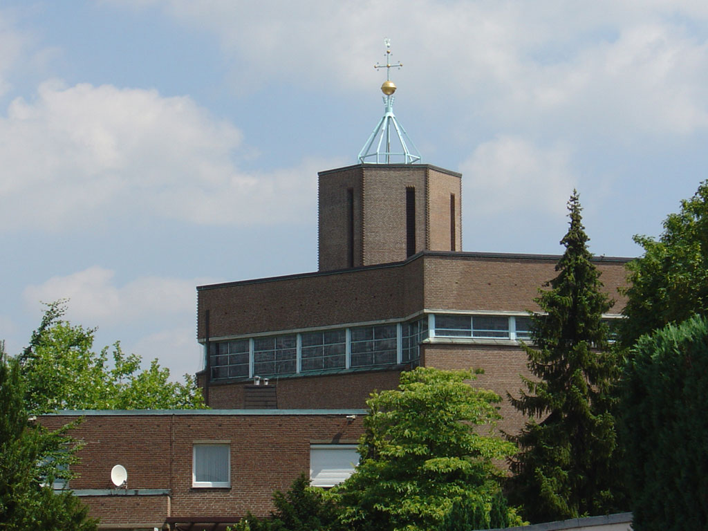 Pfarrkirche St. Paulus, im Vordergrund das Pfarrhaus. Architekt: Hans Schilling